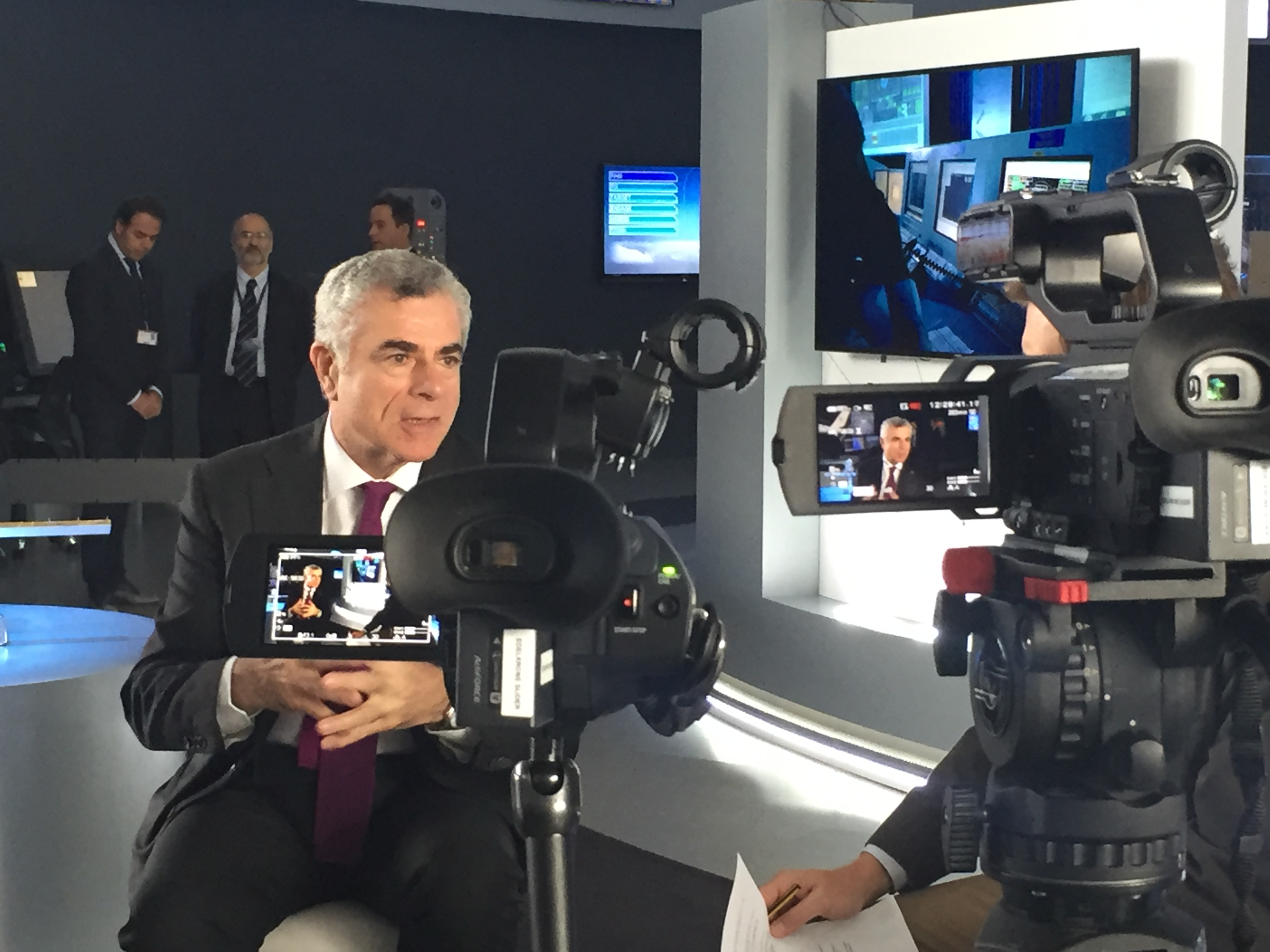 Mauro Moretti